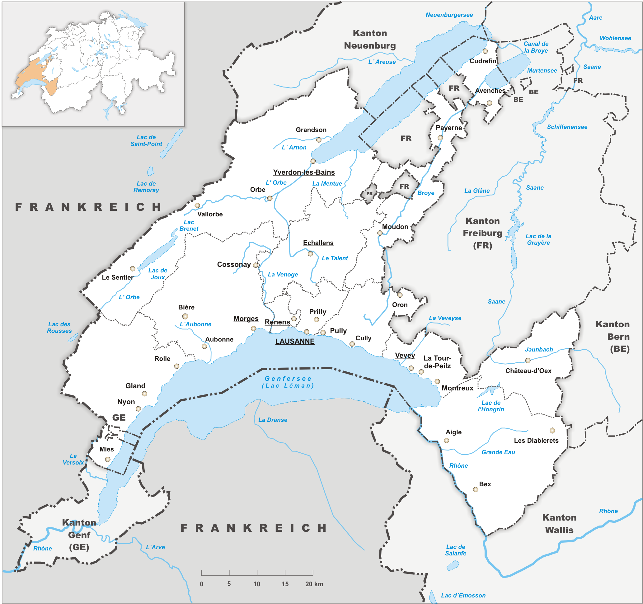 Karte des Kanton Waadt.